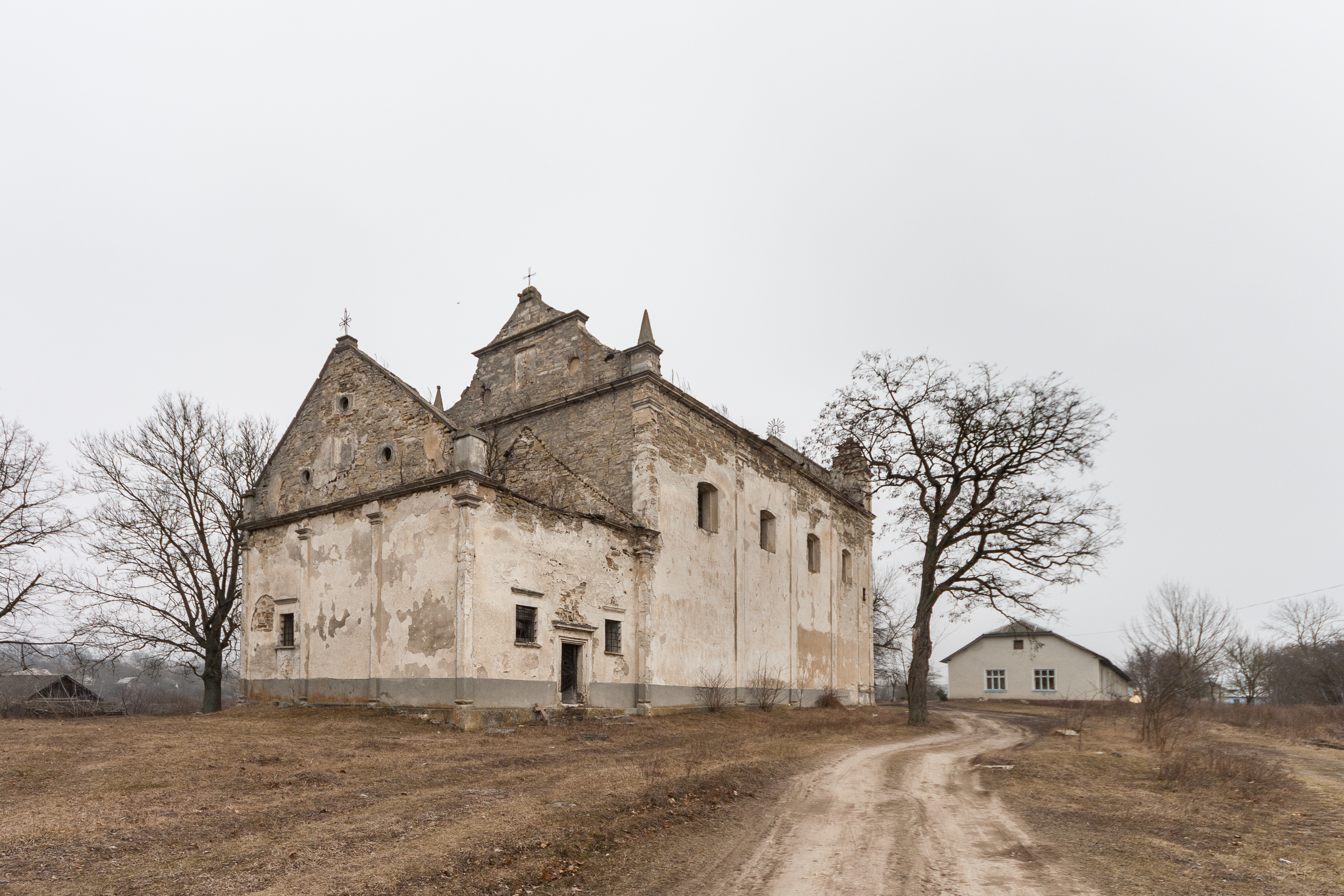 Костел (мур.), Личківці